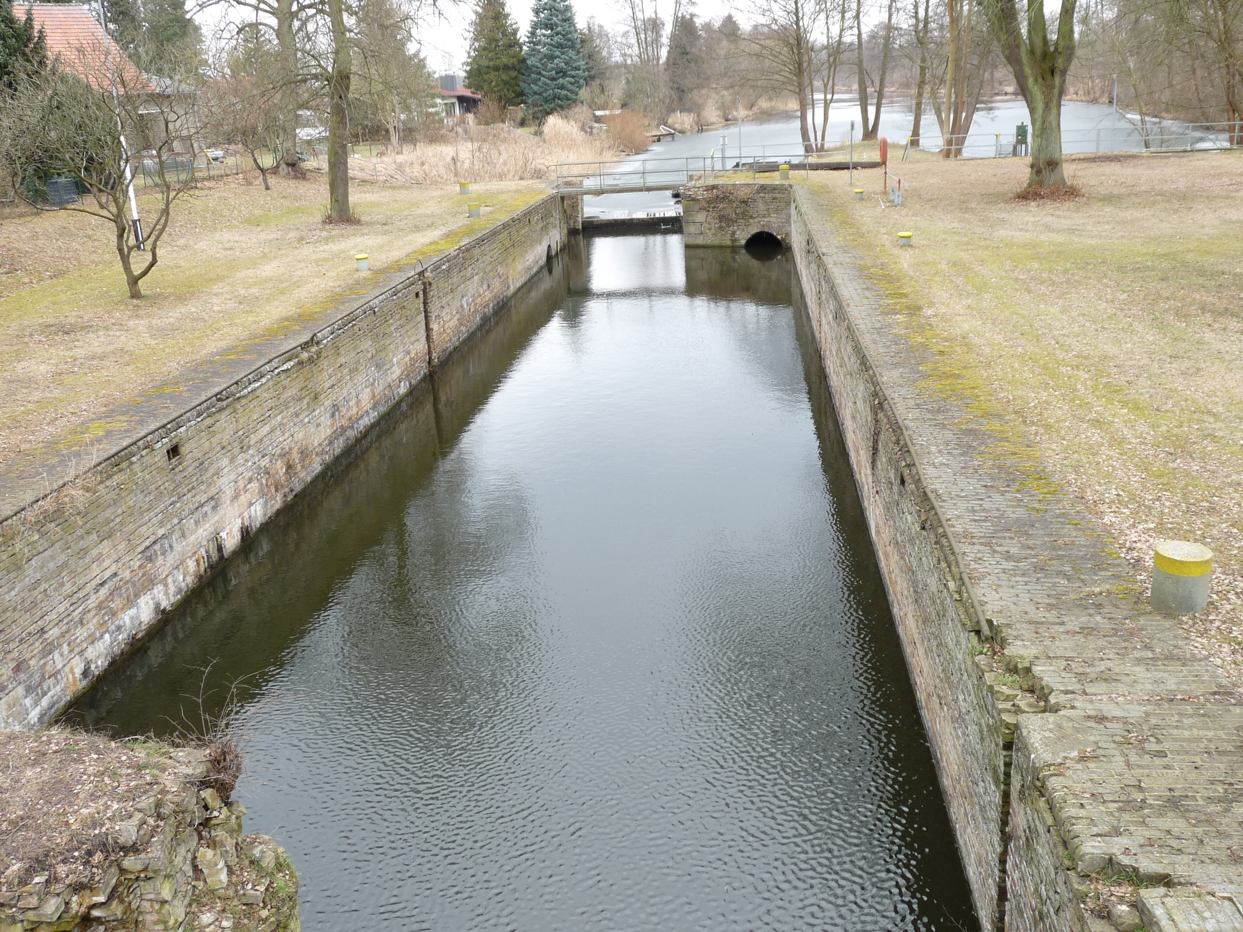 Die Schleuse Sachsenhausen ist eine heute nicht mehr nutzbare Schiffsschleuse im Ortsteil Sachsenhausen im Oranienburger Kanal. Blickrichtung Nordosten von der Straßenbrücke Chaussestraße über die Schleusenkammer zum Oberhaupt der ehemaligen Schleppzugschleuse.